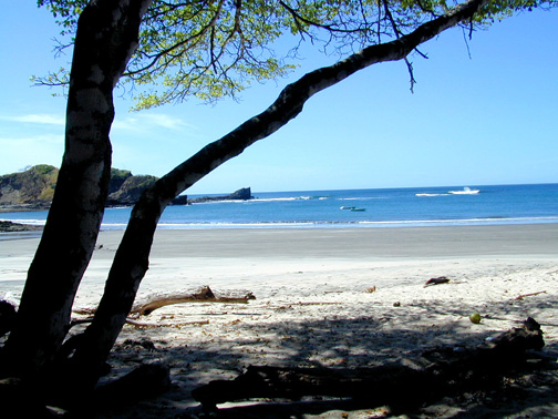 Pelada Beach, Nosara, Nicoya, Guanacaste, Costa Rica